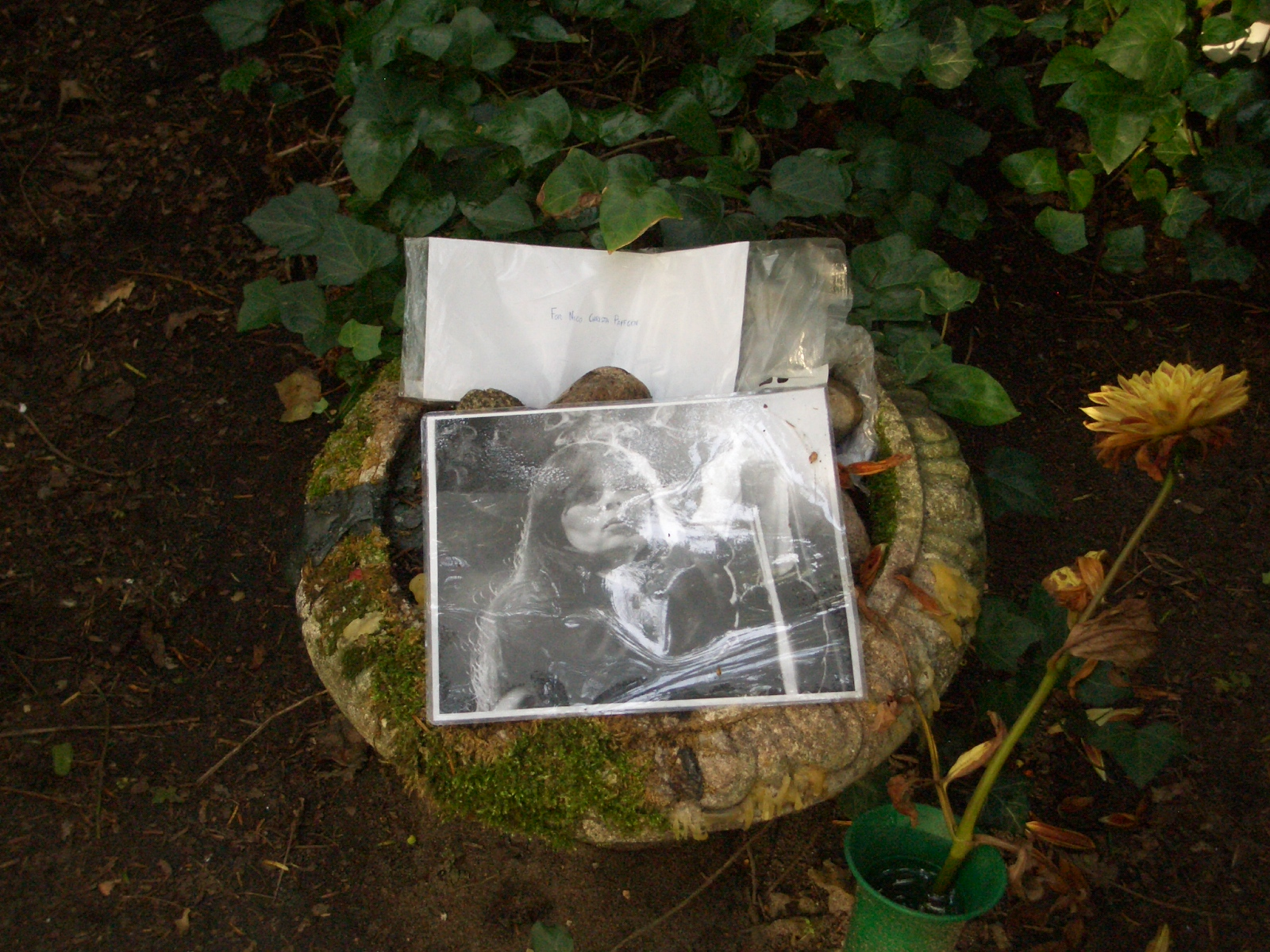 Ein geschlossener Brief eines unbekannten Fans (Gabriele von Florenz) an Nico auf ihrem Grab abgelegt.